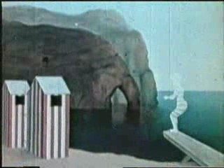 Emile Reynaud - 1895 - Autour d'une Cabine 0002